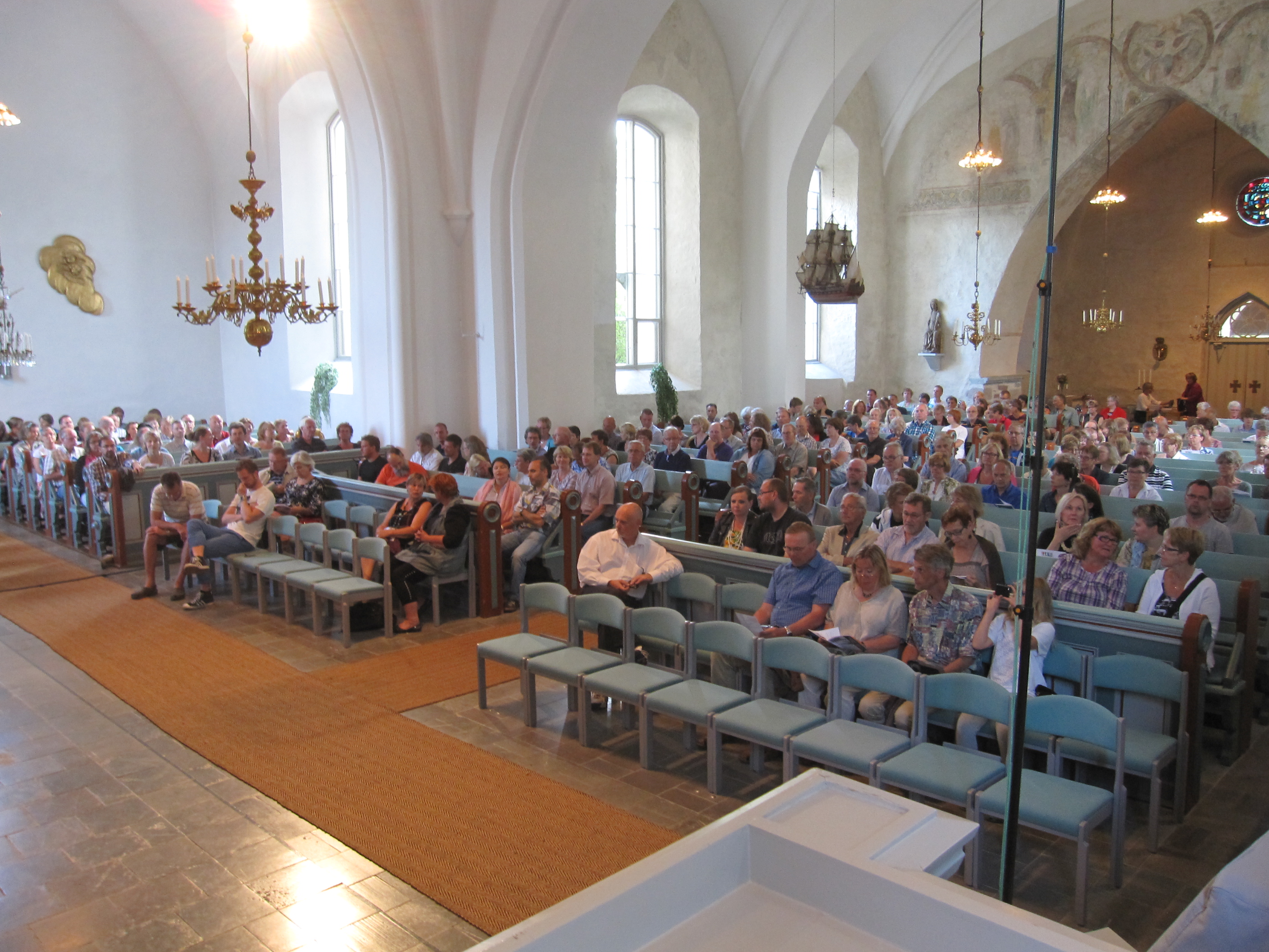 Festivalens publik